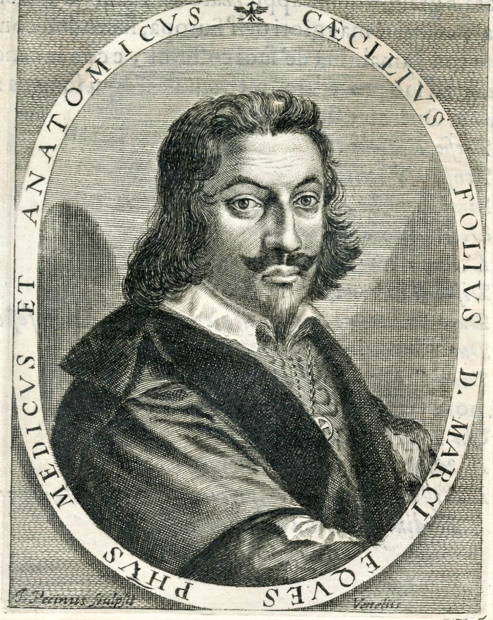 Caecilius Folius = Cecilio Follio